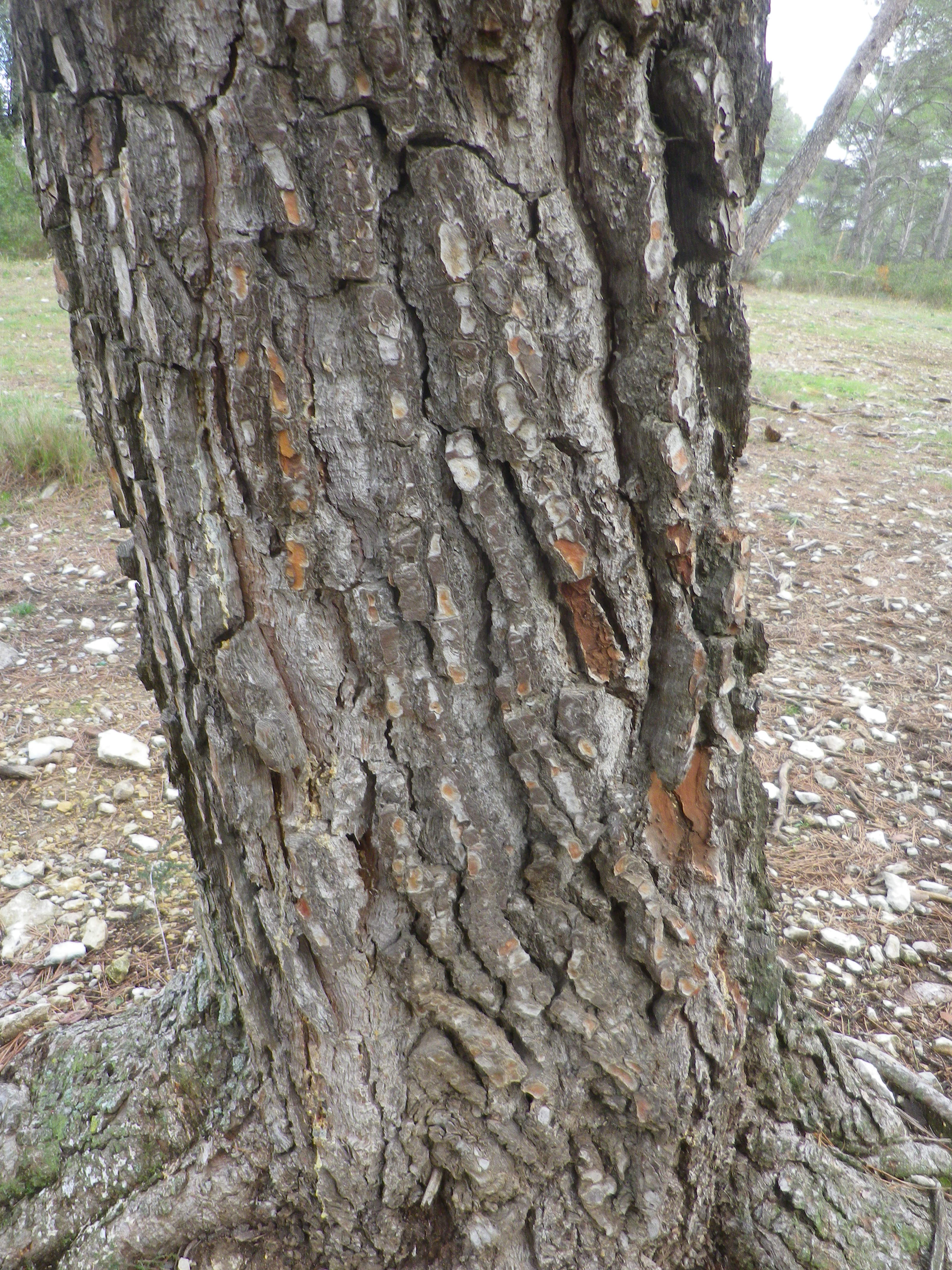 Ecorce d'un arbre en forêt